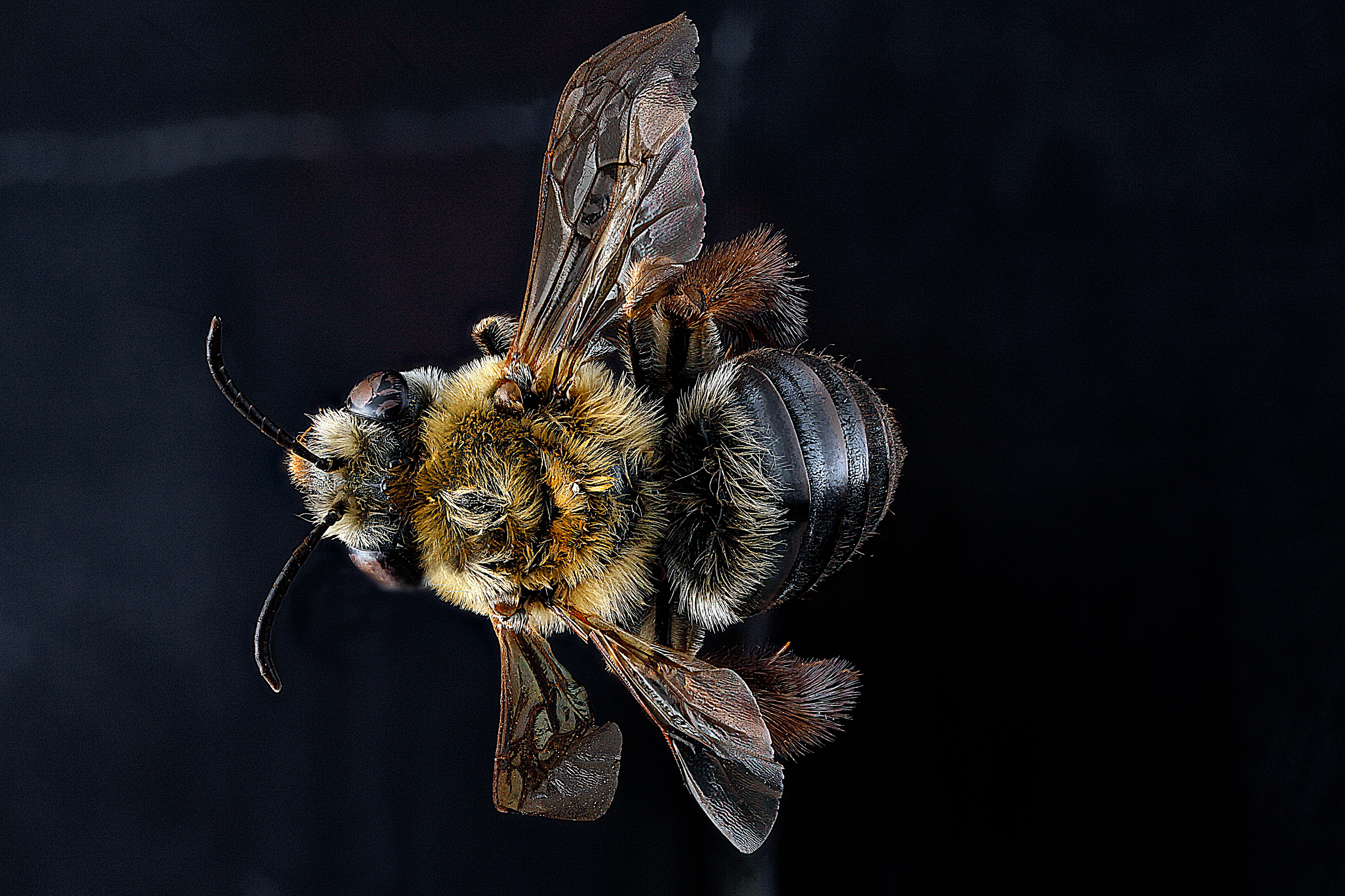 Eucera rosae, female